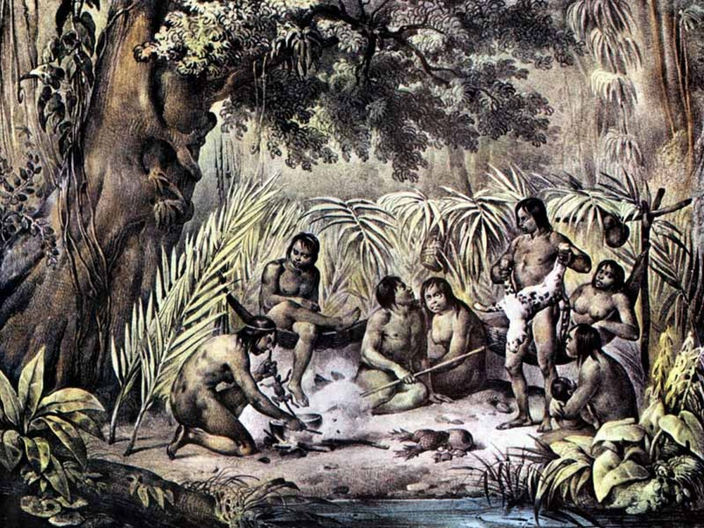 Tribo indígena, retratada por Rugendas